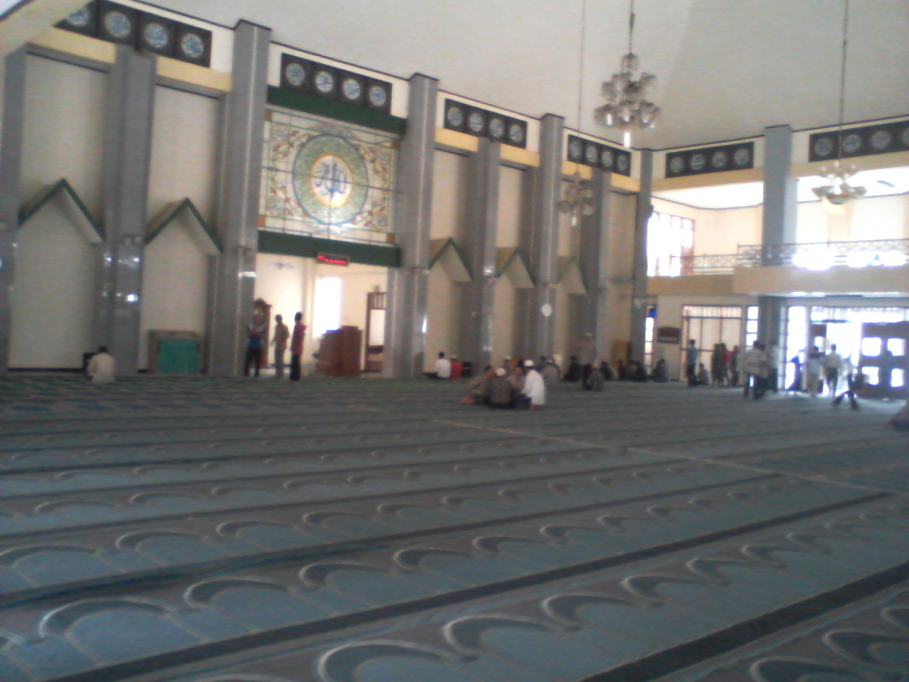 Bagian dalam dari masjid Agung Garut